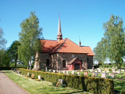 Veta kyrka